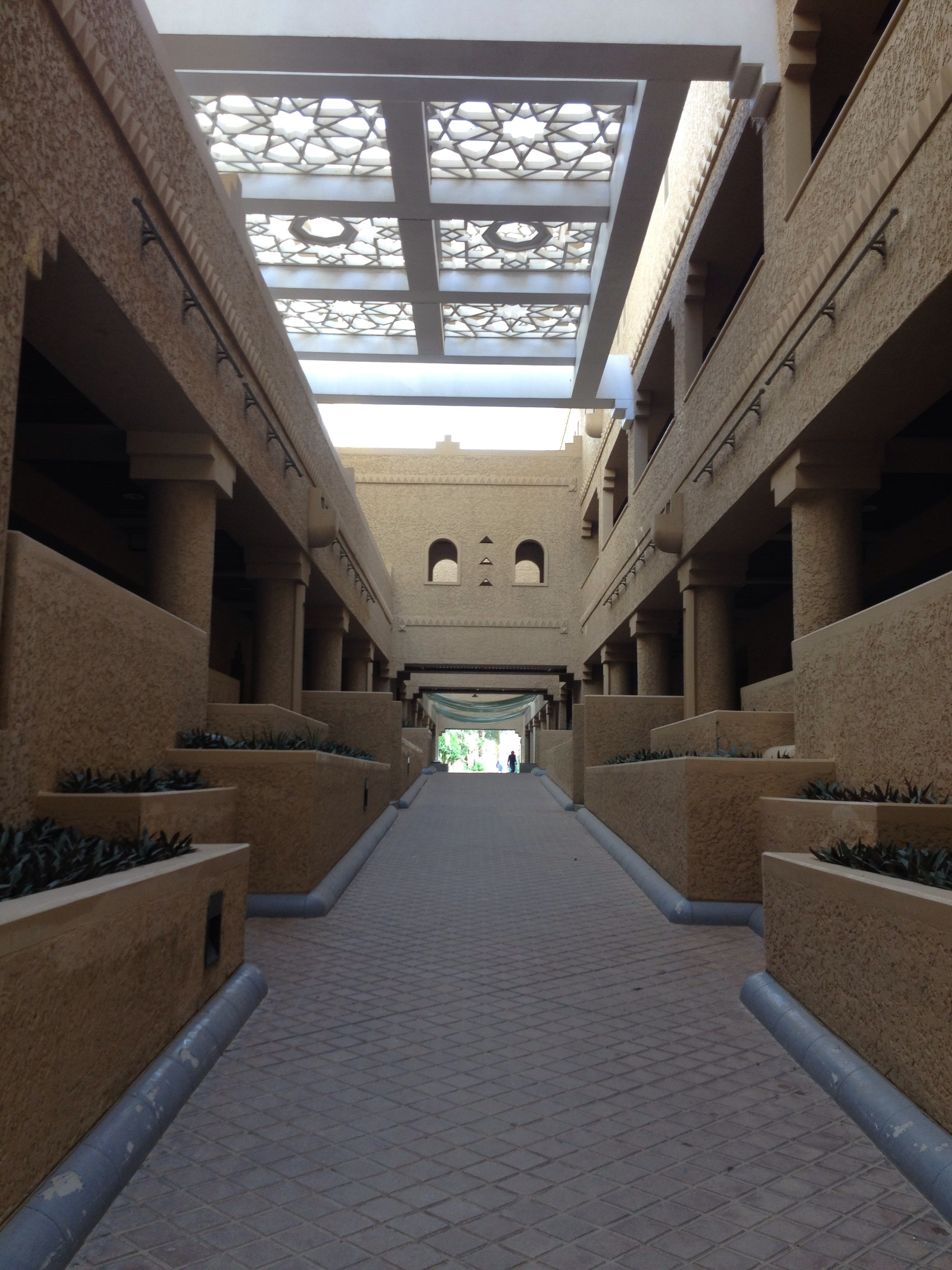 في حي السفارات